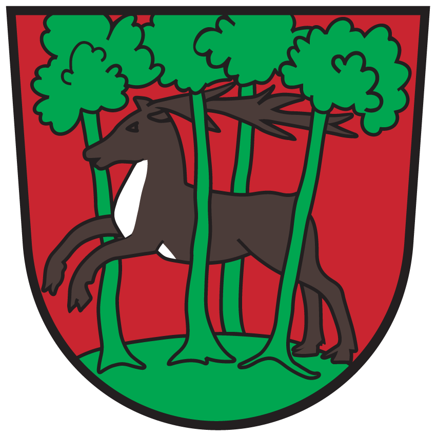 Wappen von Weitensfeld im Gurktal